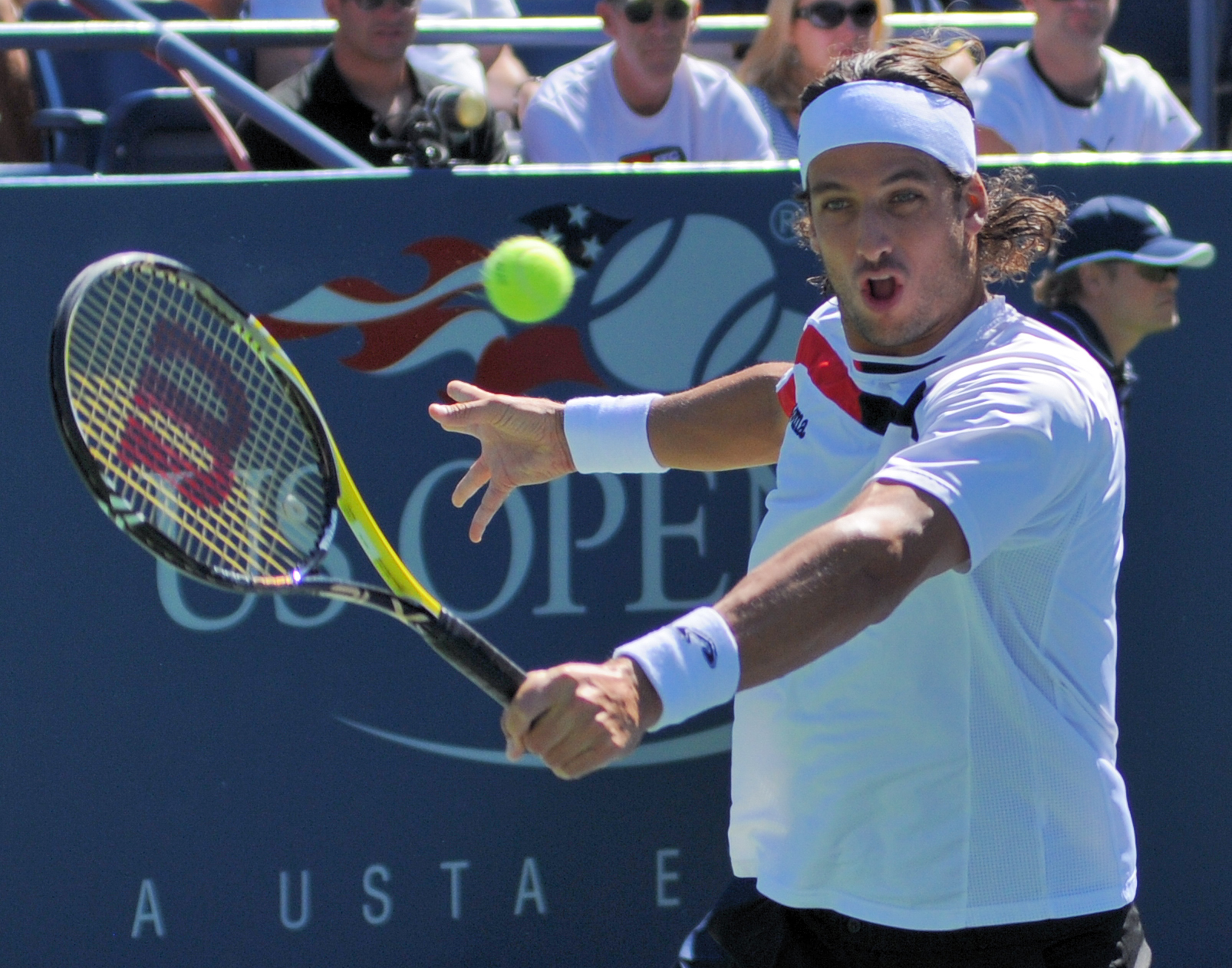 Feliciano Lopez - US Open 2010